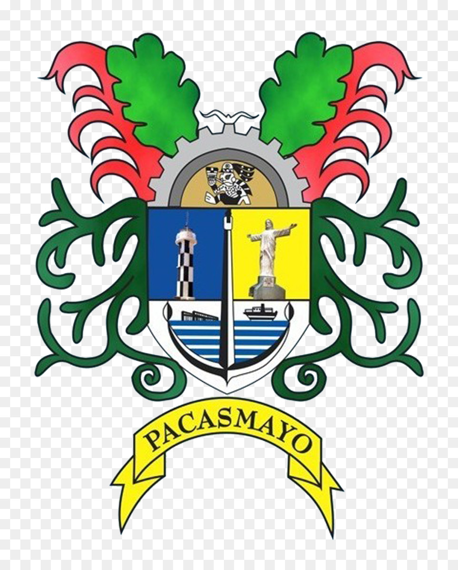 Escudo de la ciudad del Pacasmayo